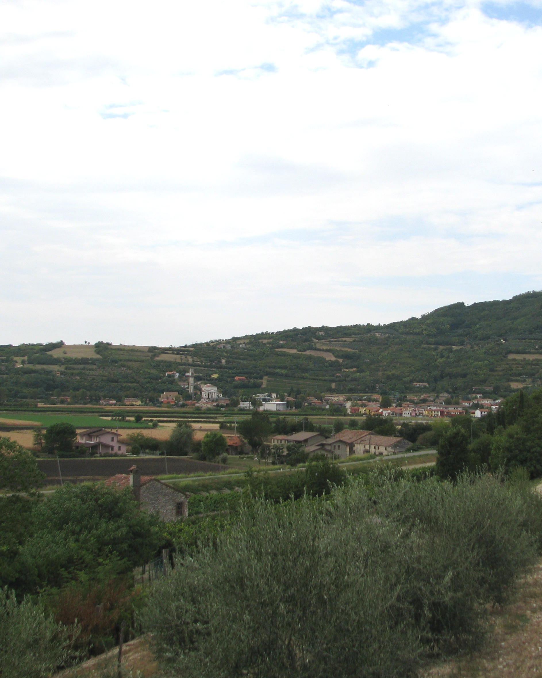 Veduta di Lozzo Atestino ai piedi dell'omonimo Colle